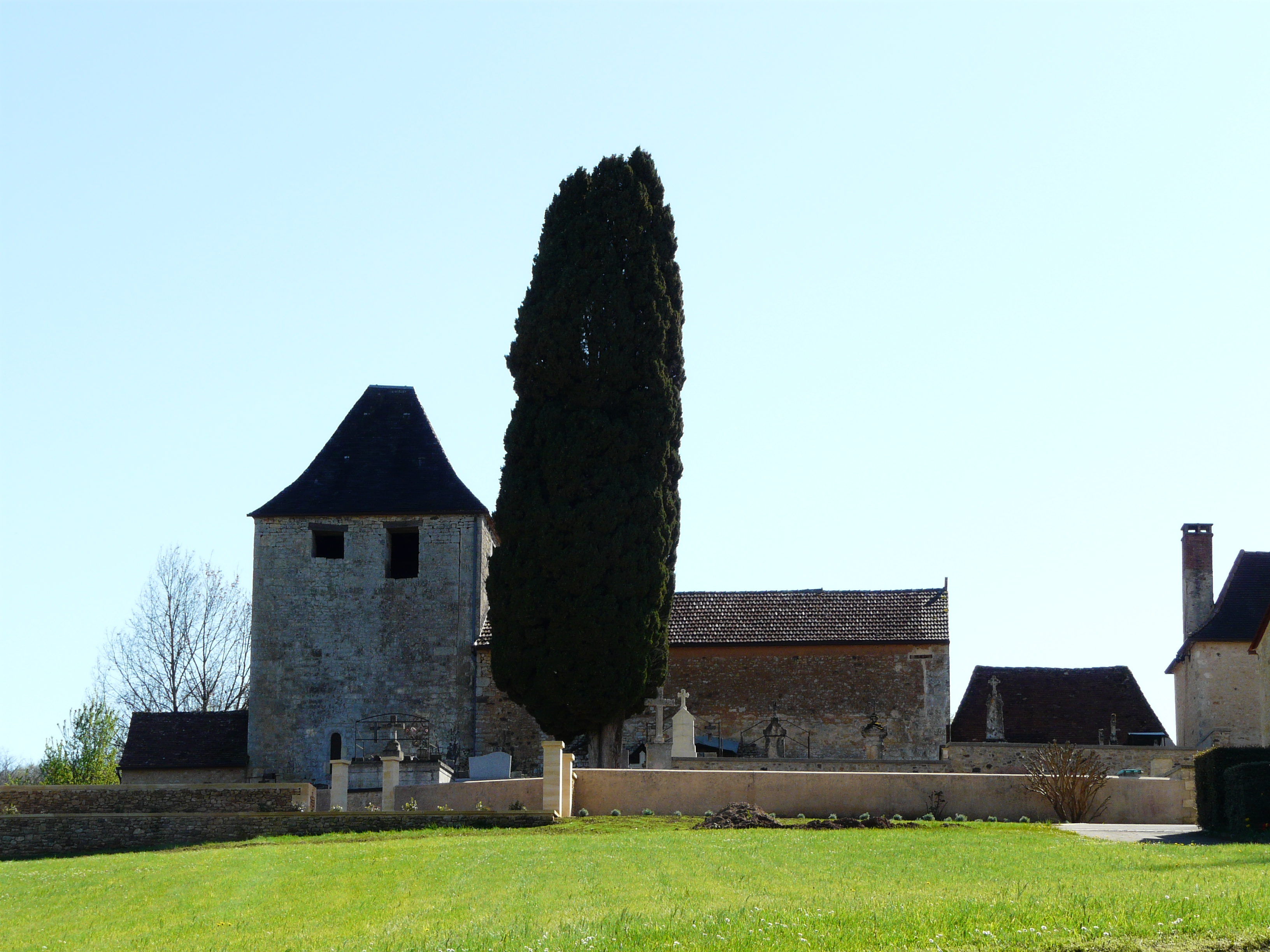 L'église Saint-Avit vue depuis le nord, Saint-Avit-de-Vialard, Dordogne, France.